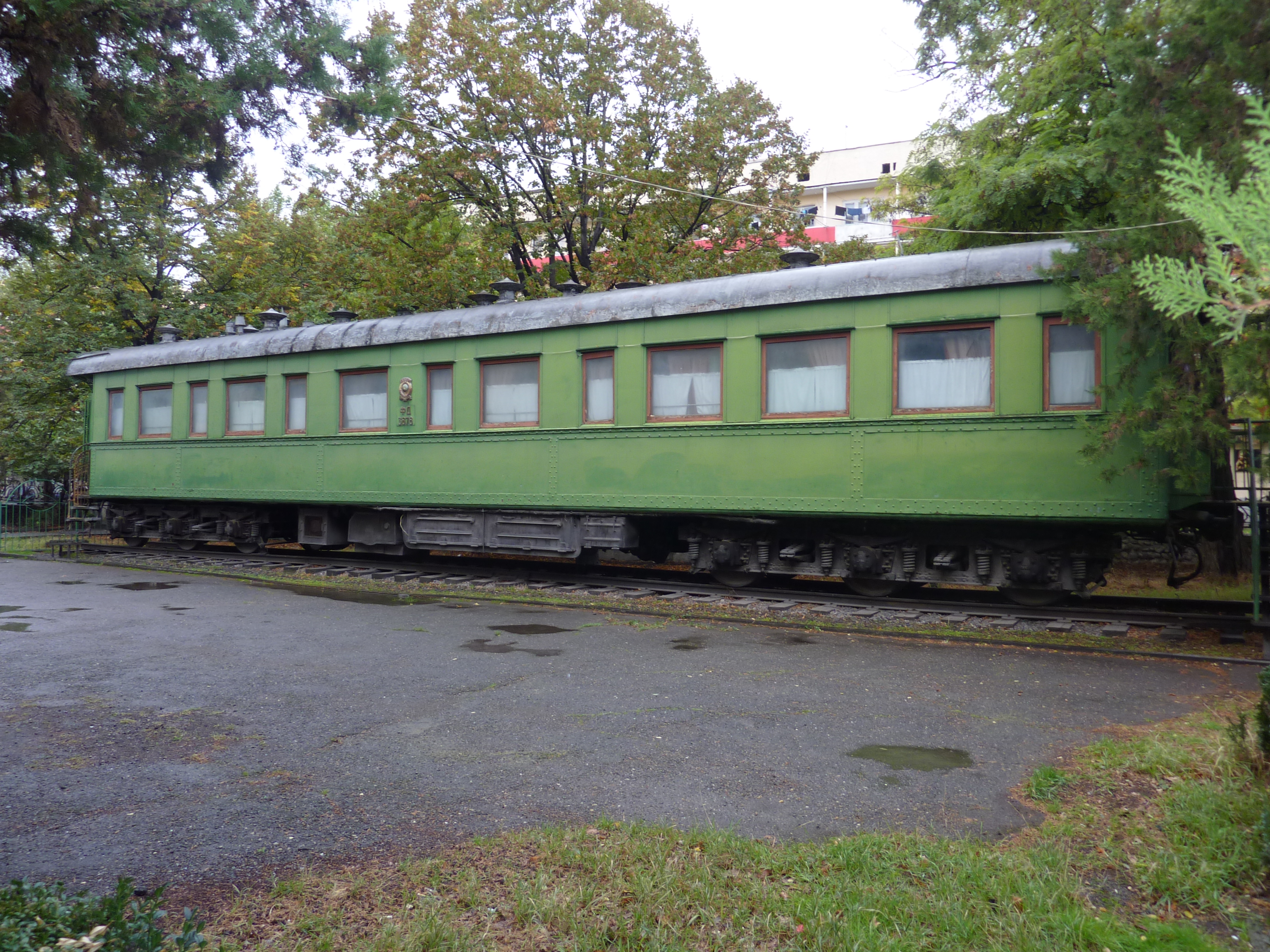 Le train de Staline au musée Staline de Gori